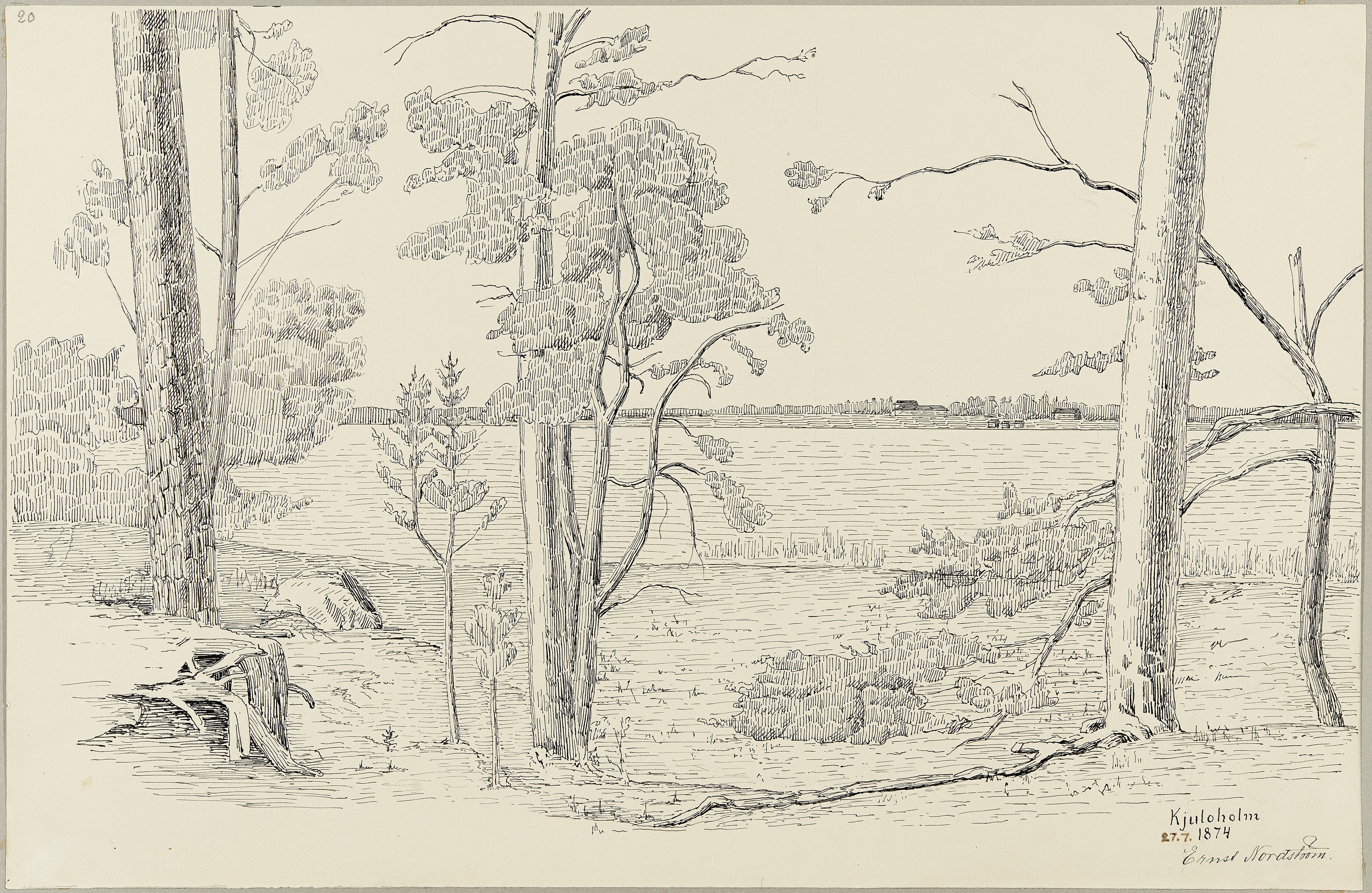 Köyliönsaaren Vanhakartano (Köyliönkartano); Kjuloholm